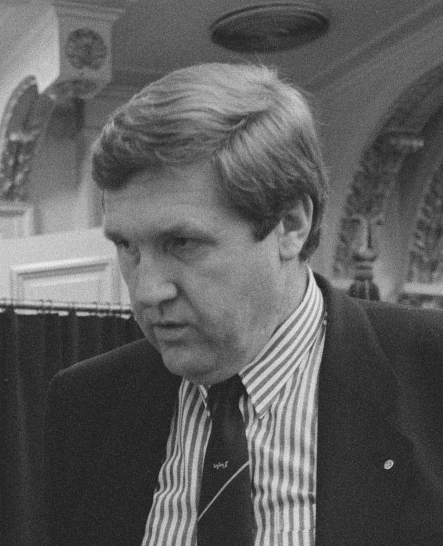 Tweede Kamer behandelt begroting van ministerie van Landbouw; minister Braks (l) en VVD-woordvoerder Blauw (r)